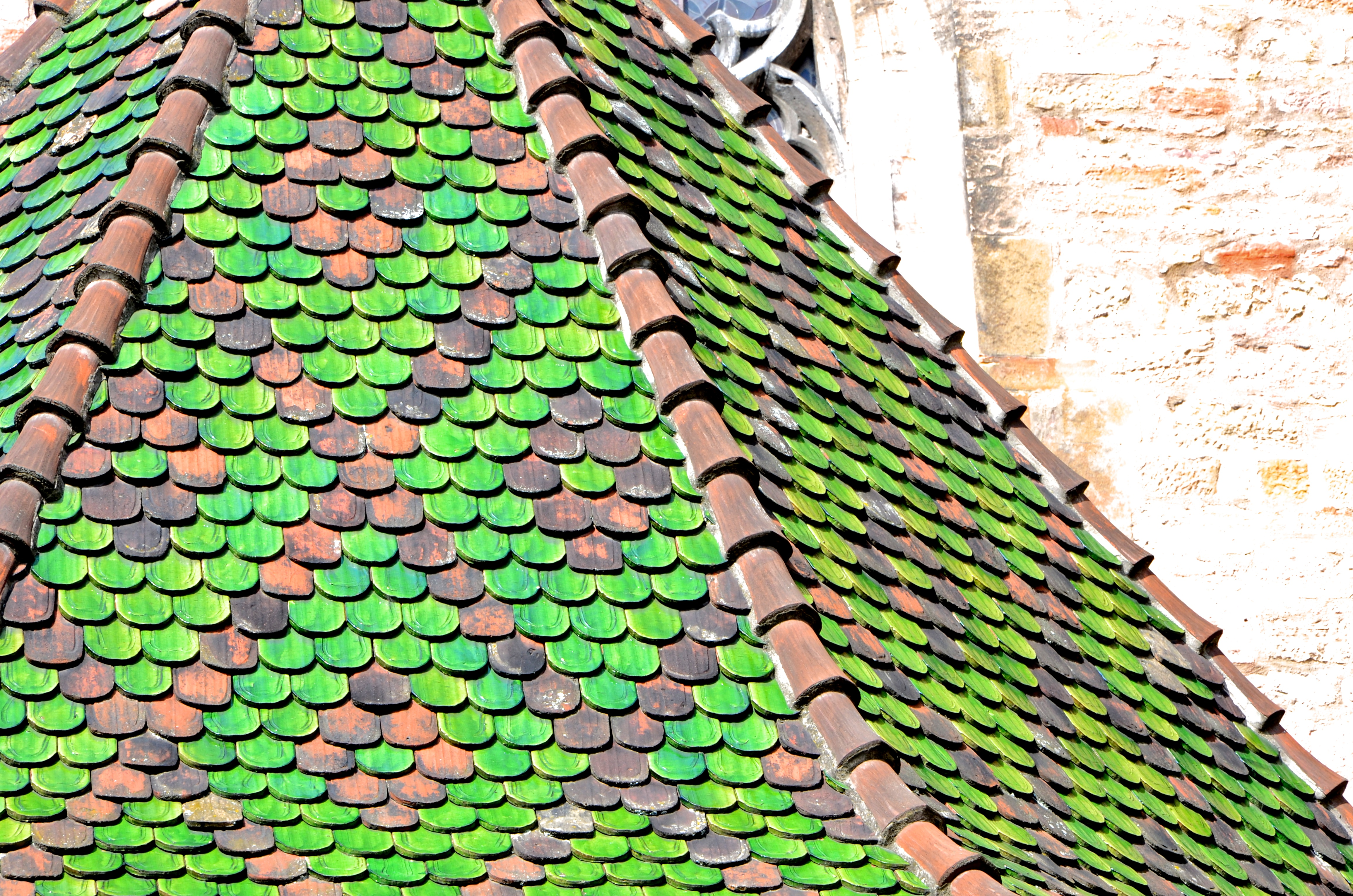 DSC_1575 - Version 2